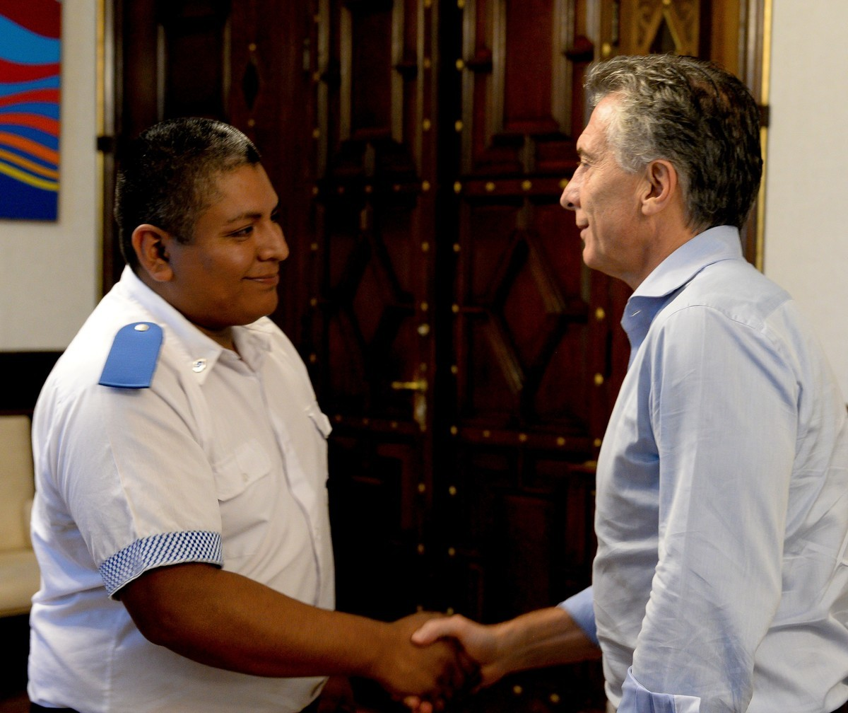 El presidente Mauricio Macri recibió en la Casa de Gobierno al policía del municipio bonaerense de Avellaneda Luis Chocobar, quien abatió a un delincuente luego de que éste asaltara e hiriera a un turista estadounidense, en un hecho ocurrido en el barrio porteño de La Boca el 8 de diciembre pasado. Por este hecho, Luis Chocobar está procesado por homicidio agravado en exceso del cumplimiento del deber.